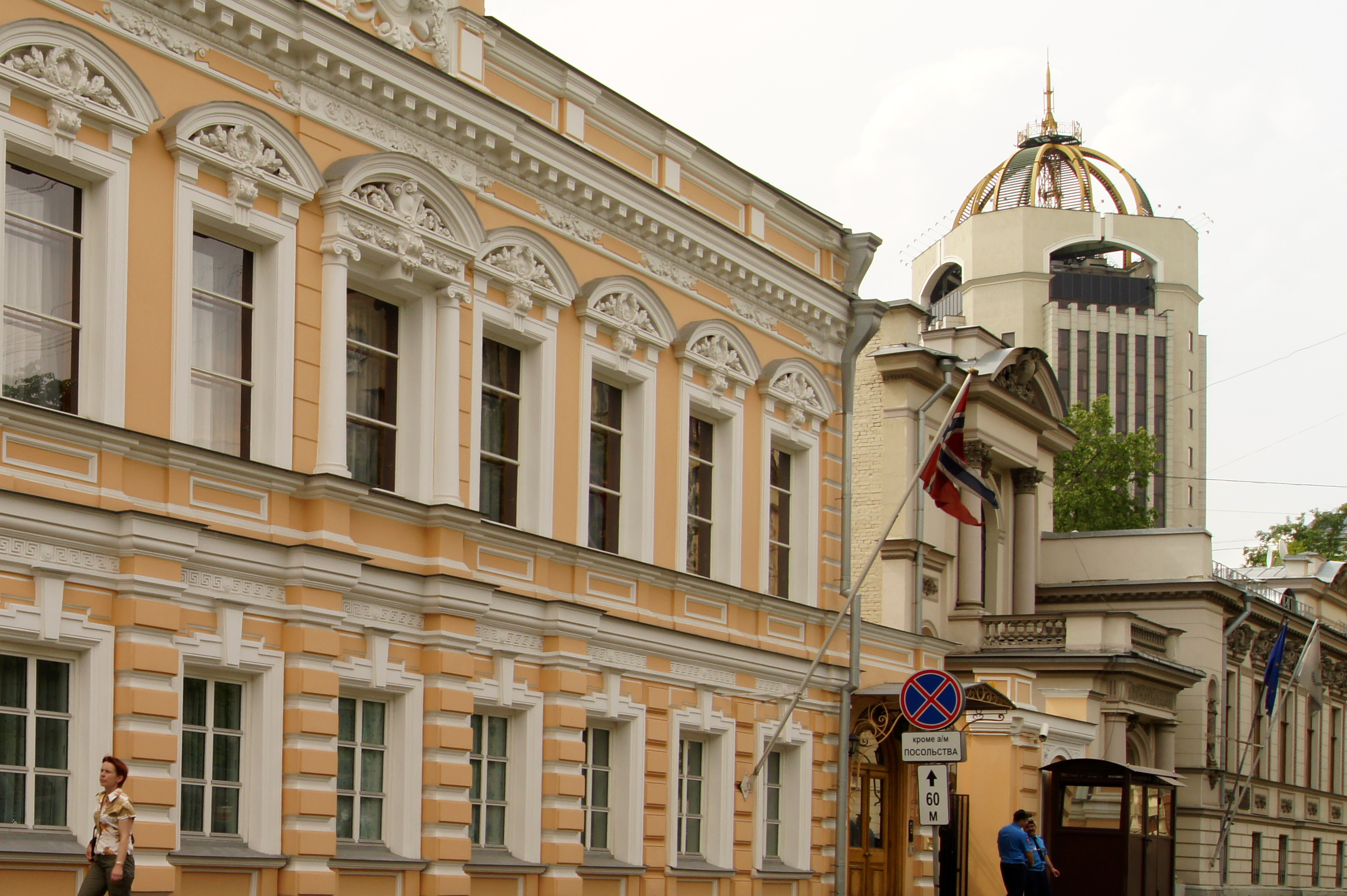 новый корпус здания Верховного суда РФ